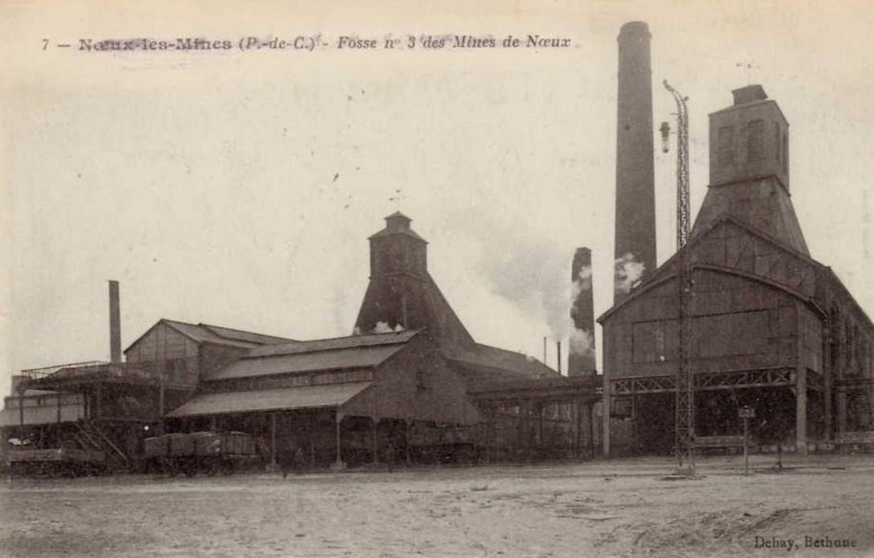 Fosse n° 3 - 3 bis de la Compagnie des mines de Nœux, Nœux-les-Mines, Pas-de-Calais, Nord-Pas-de-Calais, France.